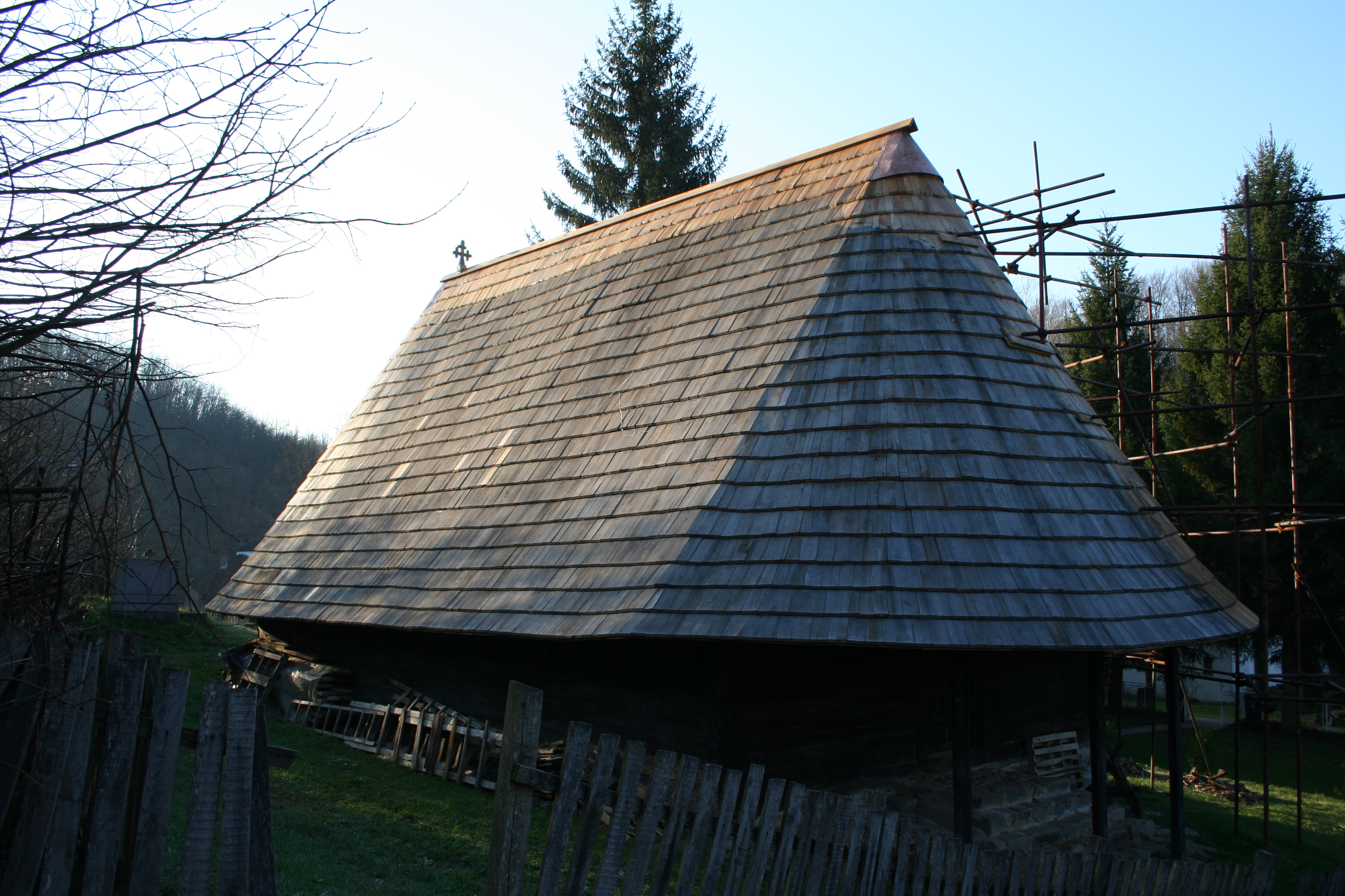 Crkva brvnara, Miličinica